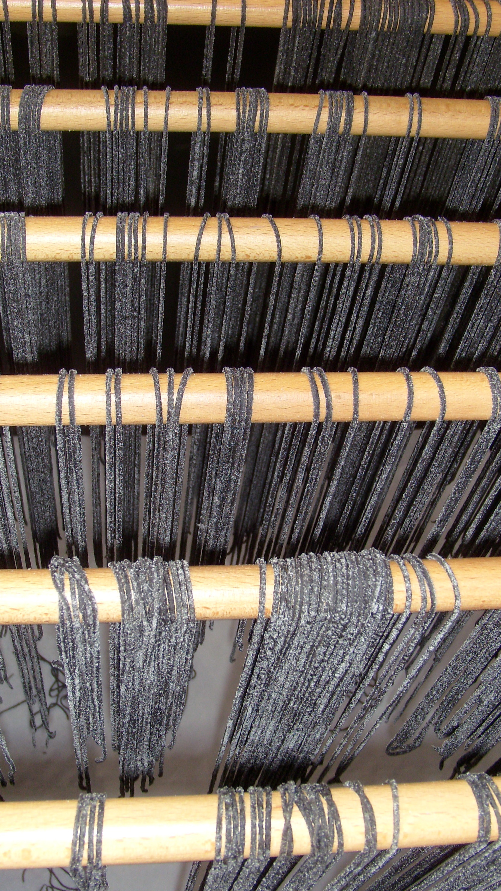 Homemade pasta nero di sepia